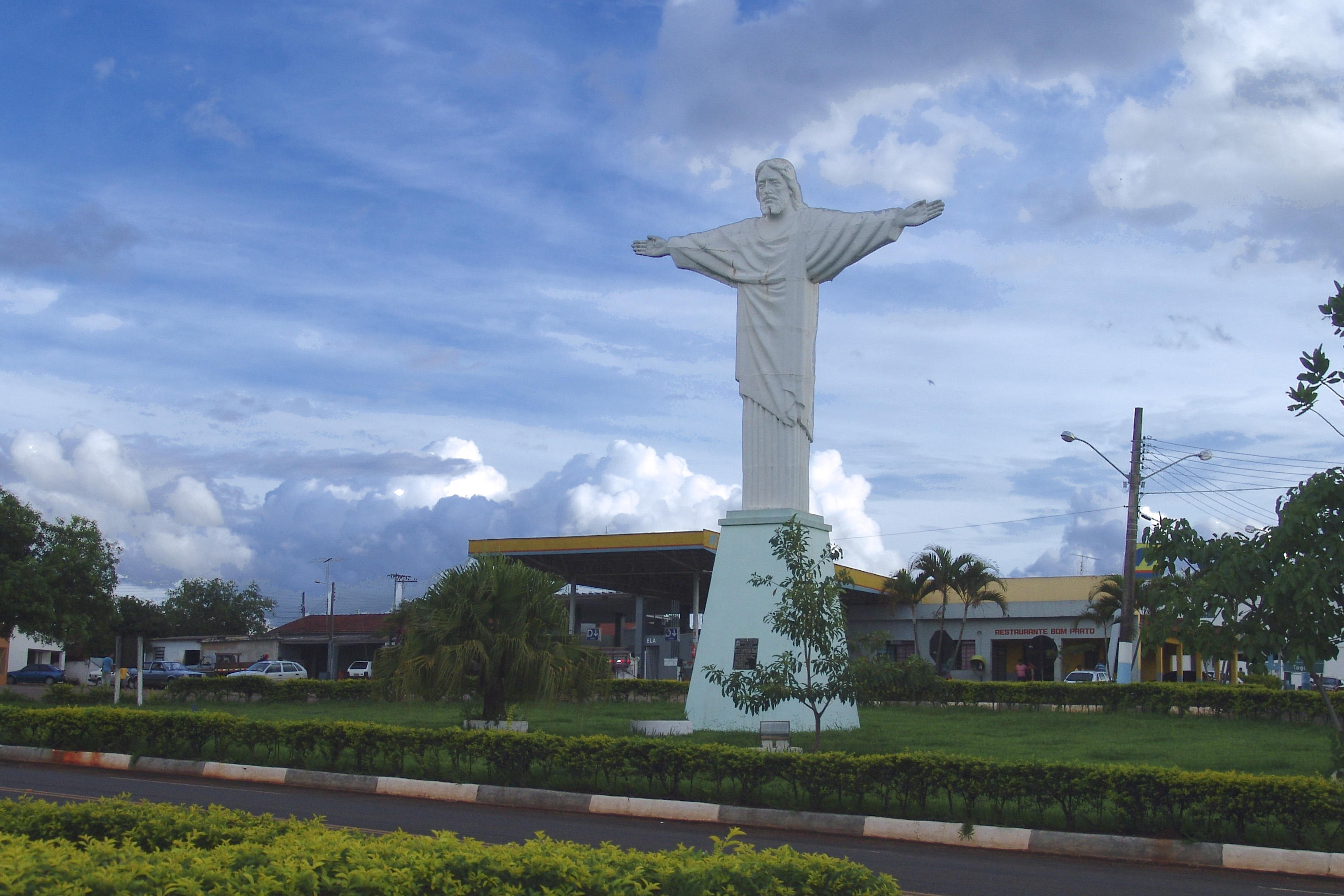 Imagem de Cristo no trevo de entrada no município de Taguaí, São Paulo, Brasil